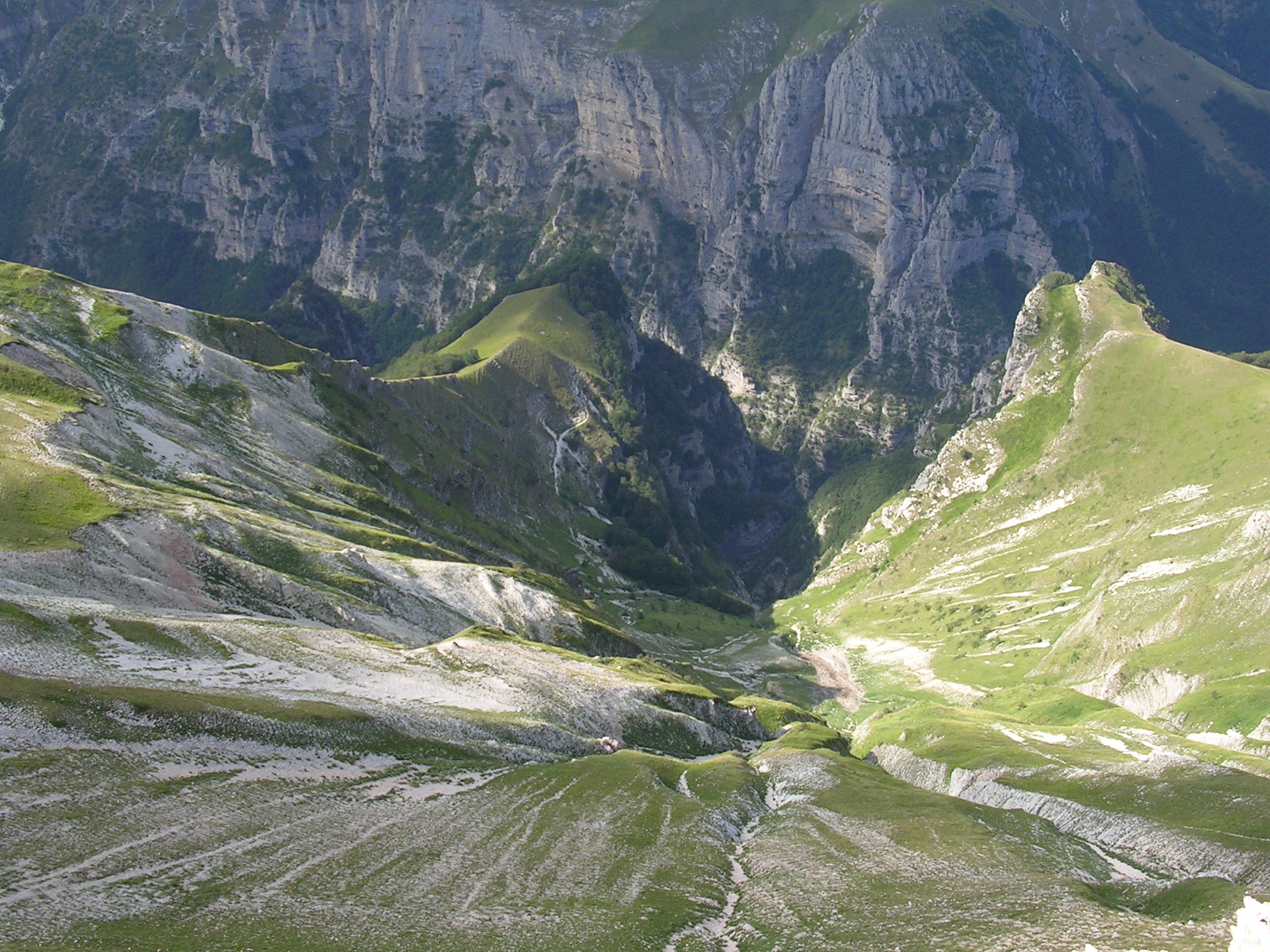 gola dell'infernaccio vista dal monte sibilla